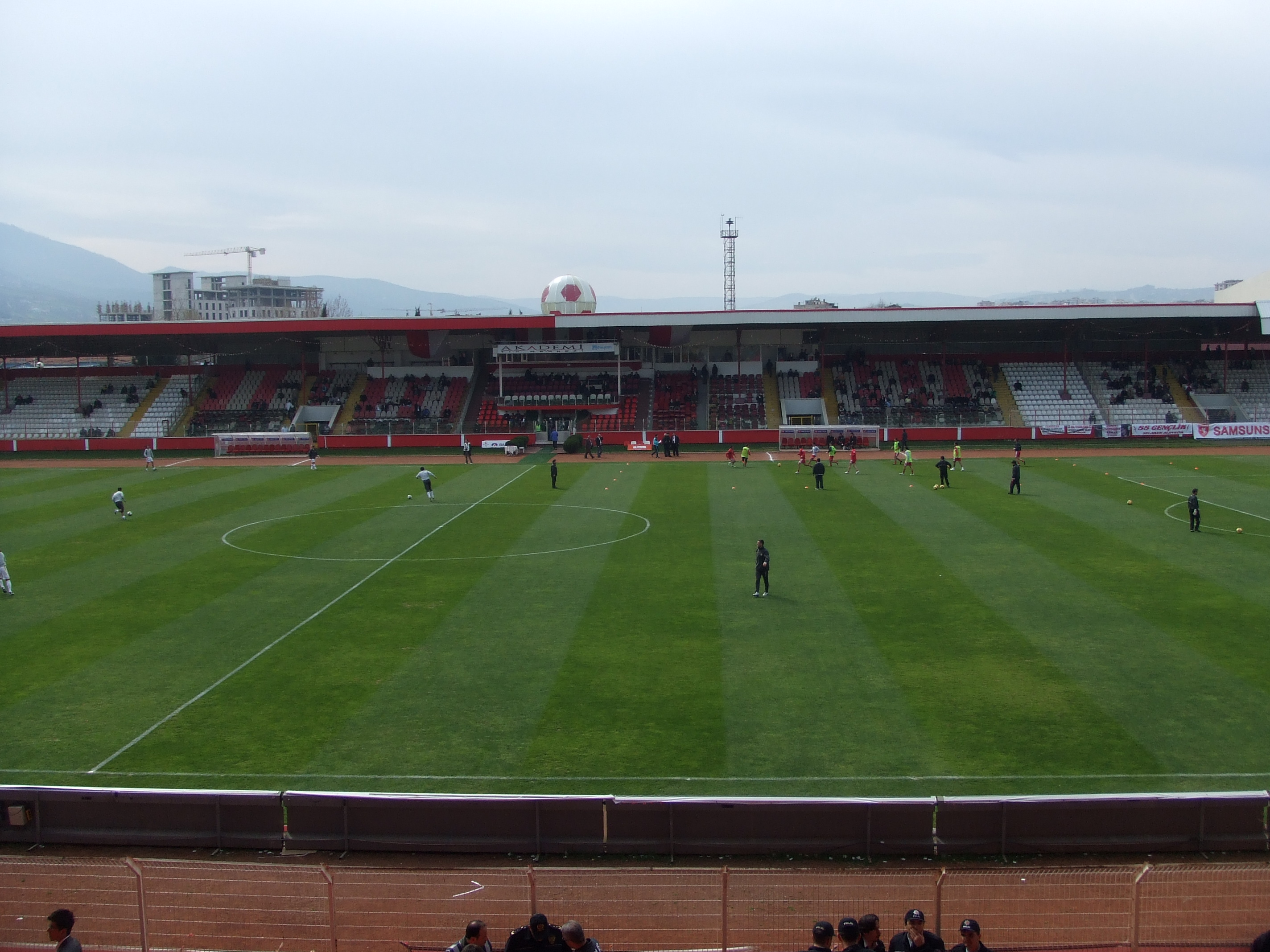 22 Mart 2009 tarihli Samsunspor - Malatyaspor karşılaşması